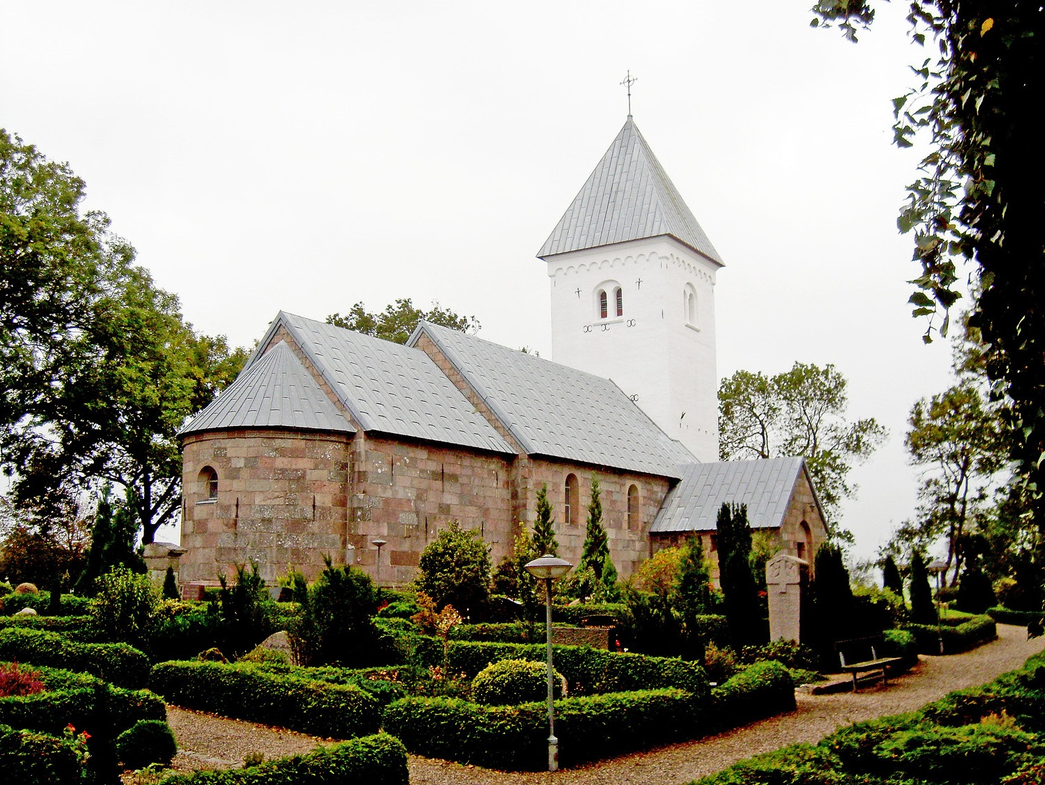 fra nordøst